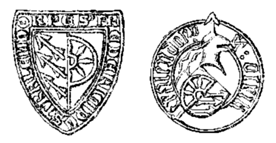 Zwei Siegel der Stralendorff, links "S.(igillum) FREDERICI DE STRALENDORPE" von 1320, rechts des Knappen Ulrich von Stralendorff von 1460